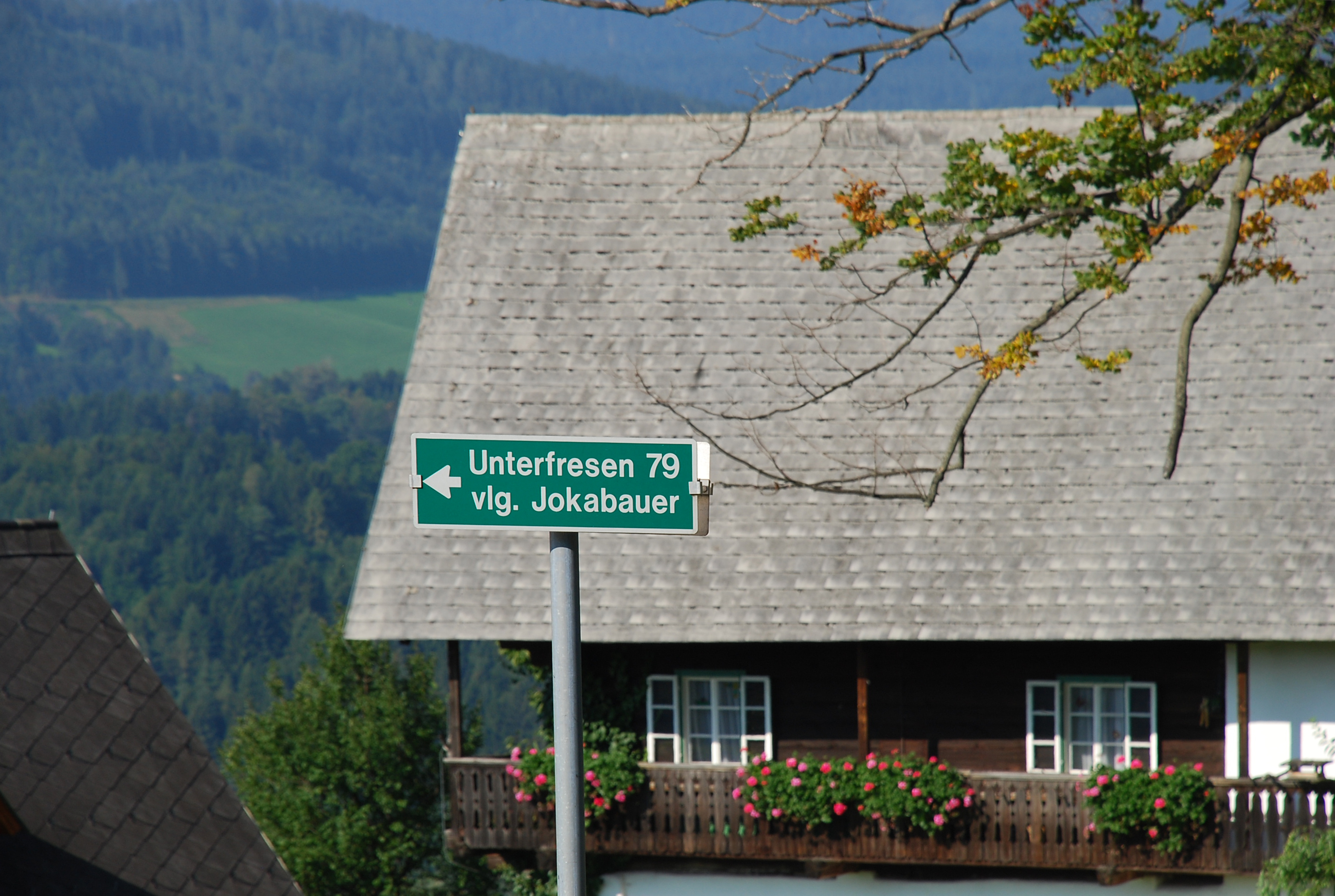 Jokabauer Schild mit Hintergrund Stöckl